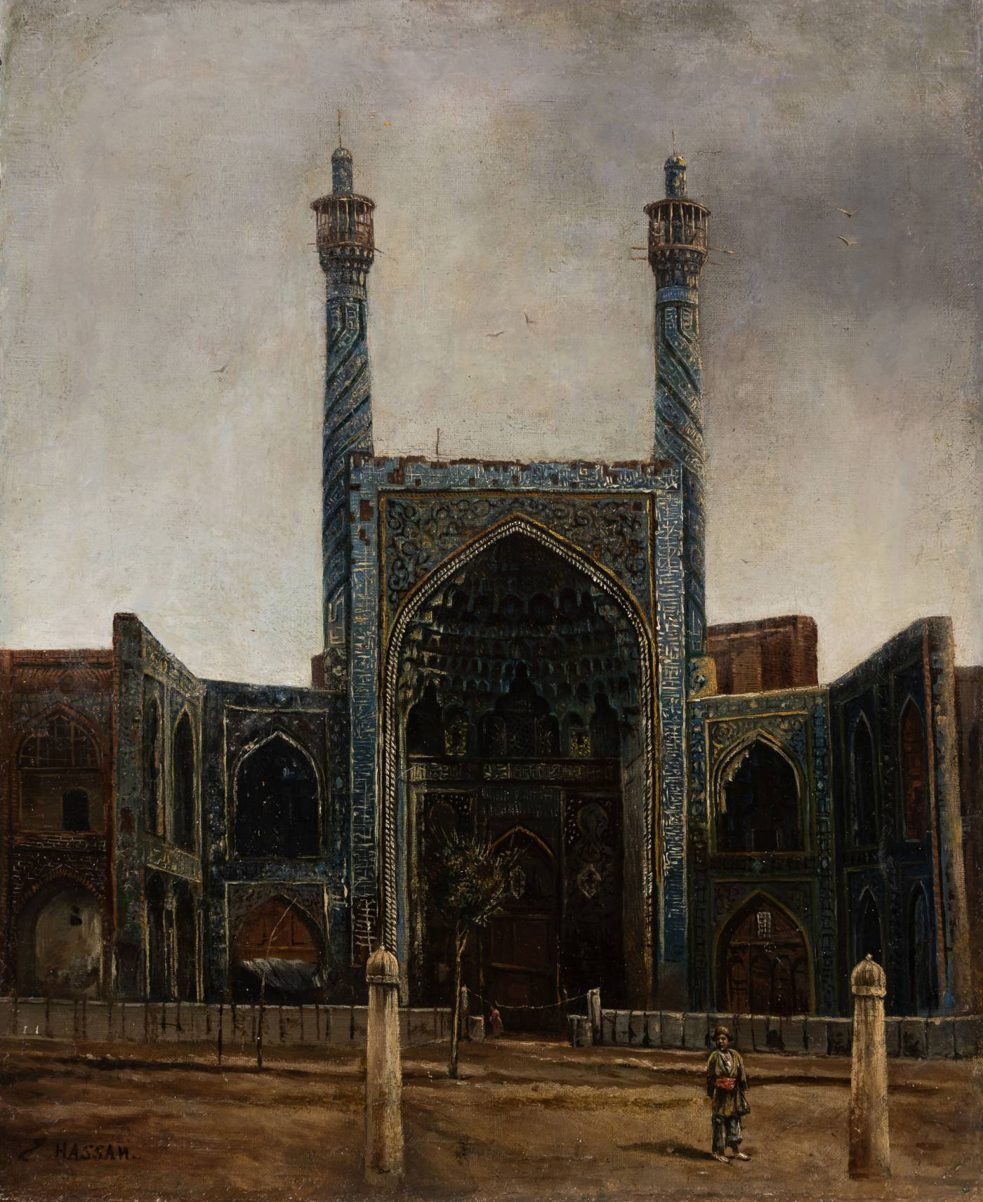 Shah Mosque of Isfahan